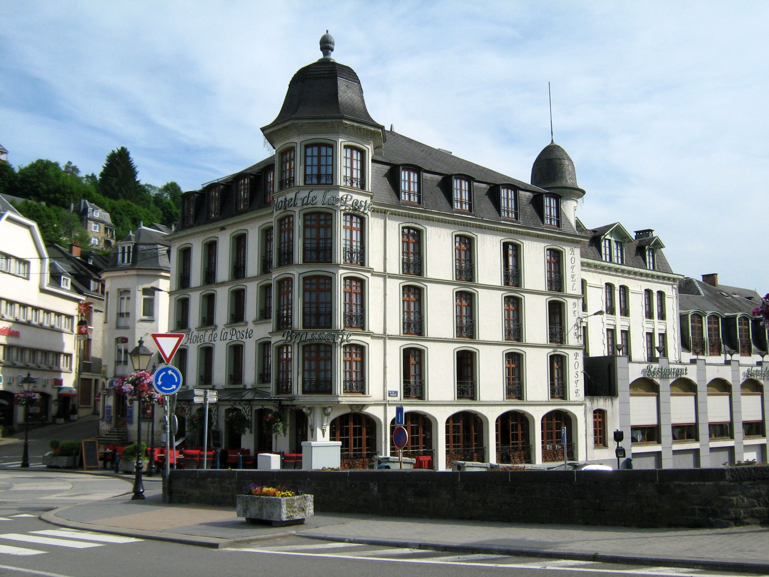 Hotel de la Poste i Bouillon, Belgien. Juni 2013.